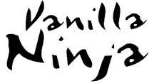 2. Logo von Vanilla Ninja (11/2003-12/2005)